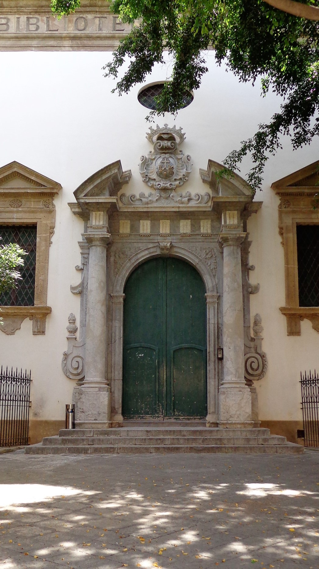 Portale.